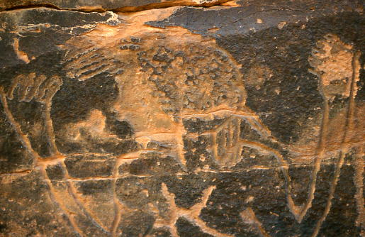 Gravure préhistorique du sud oranais, R'cheg Dirhem, Algérie